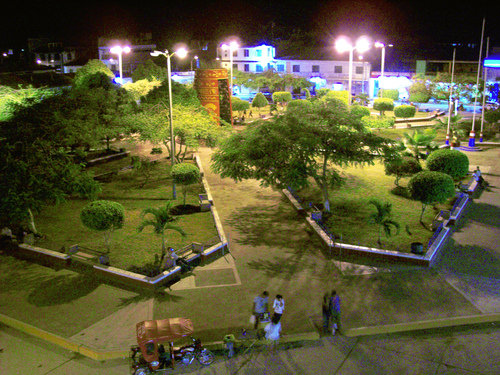 Plaza de Armas de Juanjui en la noche.